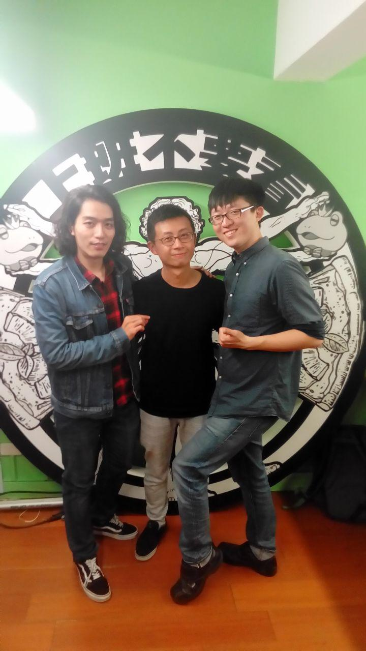 上班不要看成員，左起阿傑、呱吉、小歐